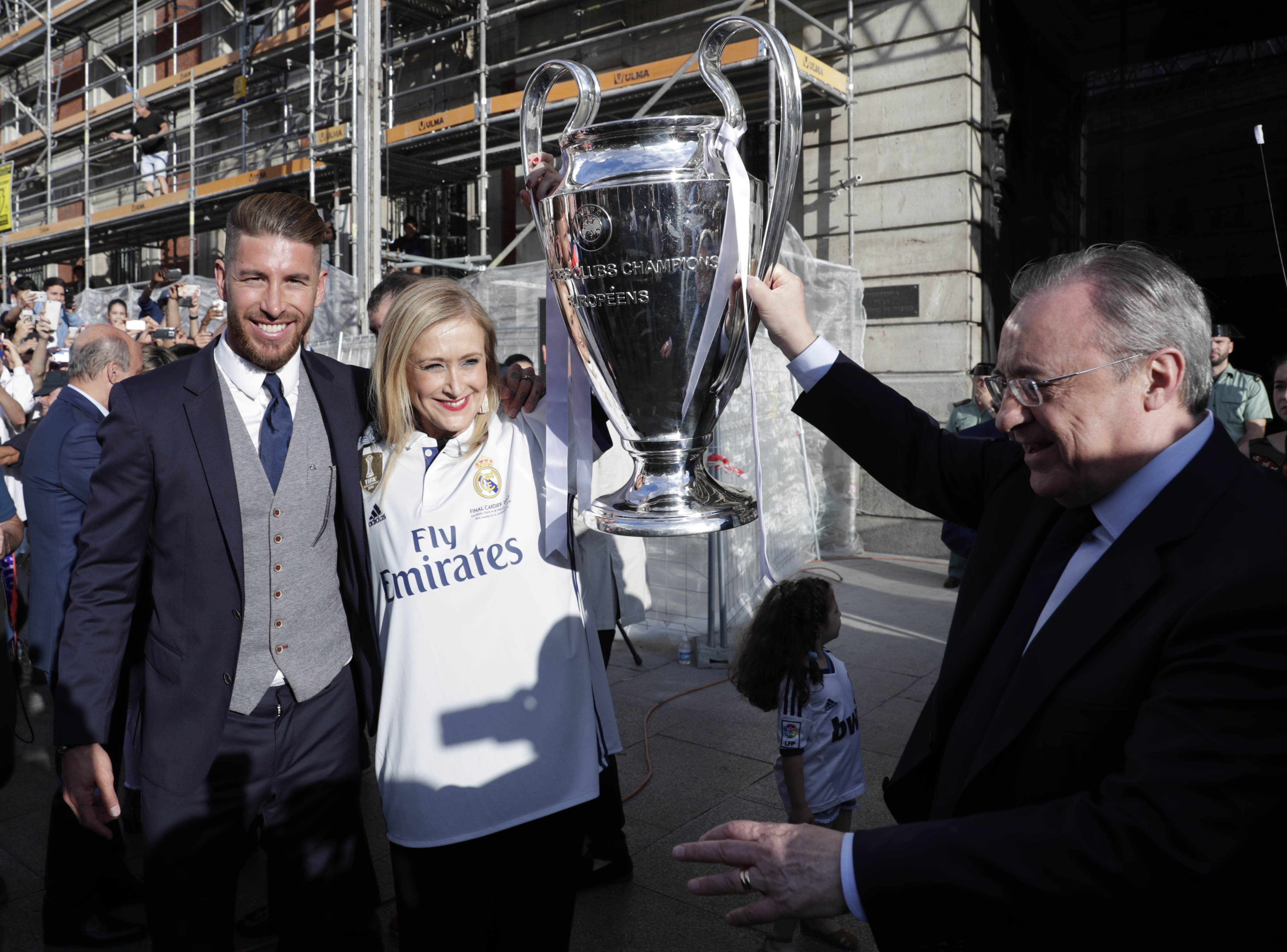 He tenido el gran honor de recibir de nuevo al Real Madrid que ha querido compoartir con todos los madrileños esta copa. Antes de nada guardamos un minuto de silencio en recuerdo de las víctimas del atentado de #Londres y quiero mostrar mi cariño, apoyo y solidaridad a las víctimas y sus familiares. Ya tenemos en la casa de todos los madrileños la réplica de la Champions y la camiseta de los campeones. Esta #Champions convierte la historia de este equipo en una historia inédita de triunfos en el fútbol mundial. En menos de dos años han ganado un Mundial, Supercopa, Liga y dos Champions. Quiero felicitar al real Madrid en nombre de los madrileños y españoles, ya que dejáis el nombre de Madrid y de España muy alto. Para mí es un honor lucir la camiseta del real Madrid que me habéis regalado porque representa tolerancia, compañerismo y la grandeza" Es un día histórico para el fútbol y muy positivo para el nombre de Madrid